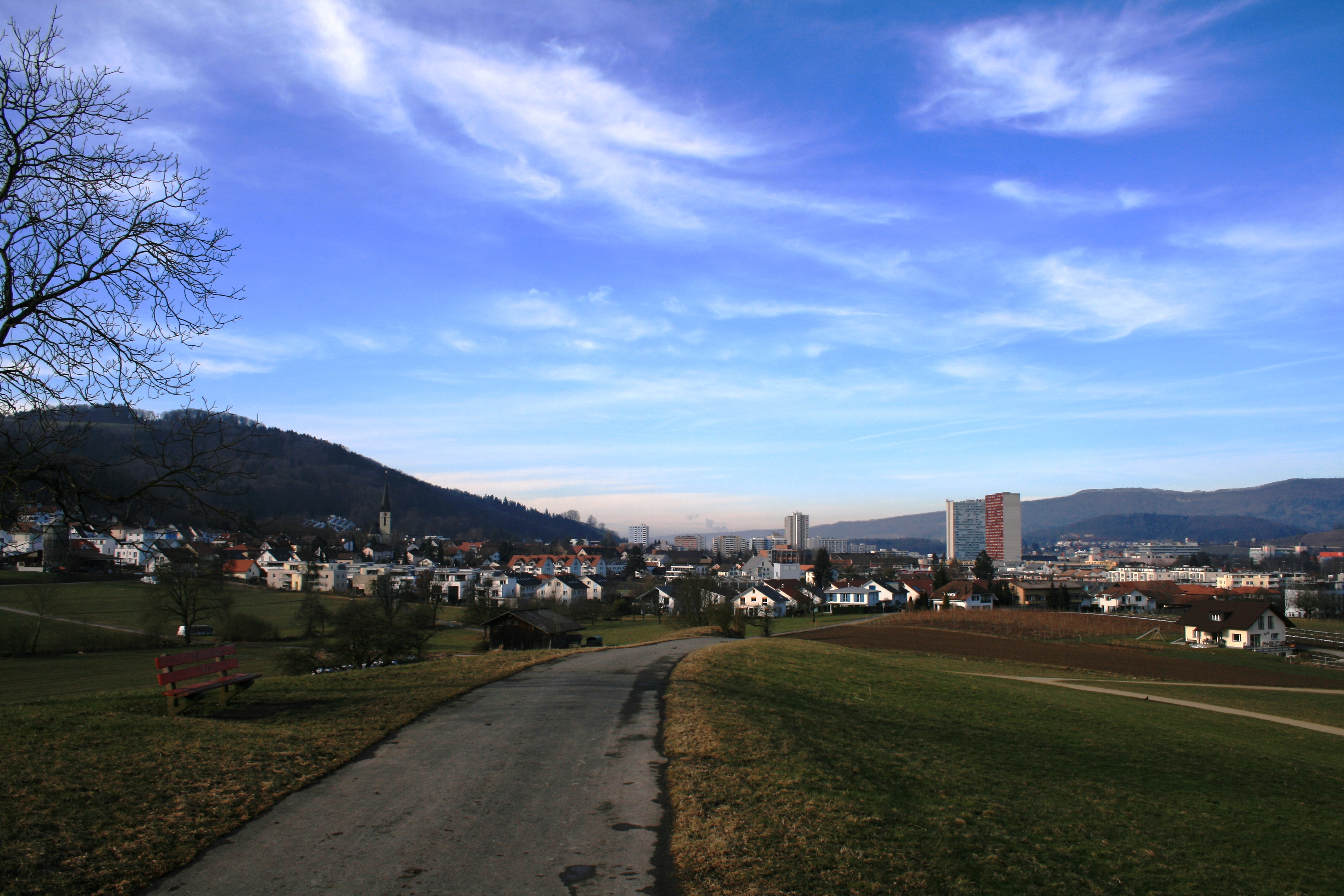 Blick auf Spreitenbach AG, Schweiz